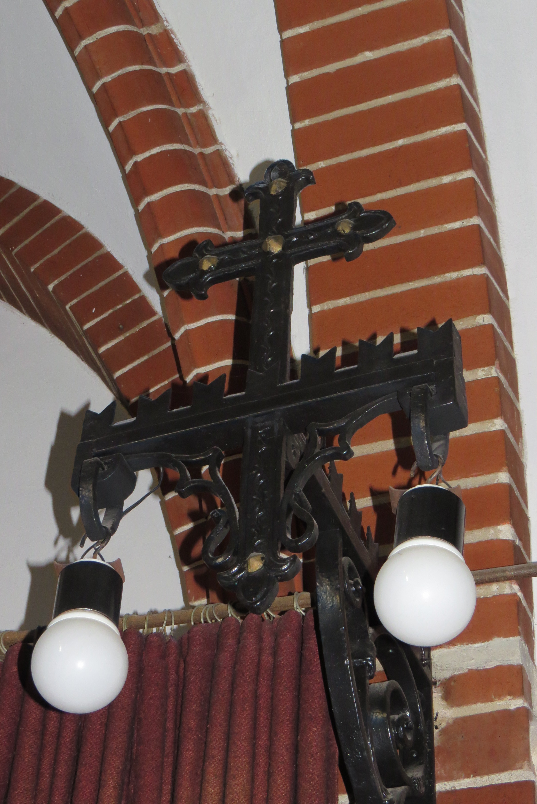 Kirche St. Georg, Berlin-Pankow, Wandleuchter